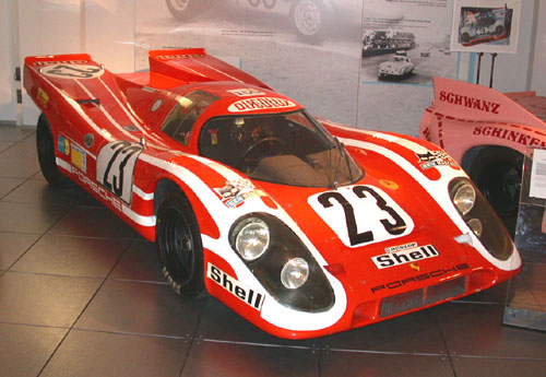 Porsche 917 Kurzheck Coupé (917 K), 1970, Chassis-Nr.: 917023